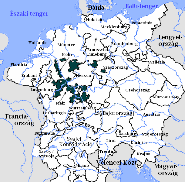 A Rajna-vidéki körzet a Német-római Birodalomban